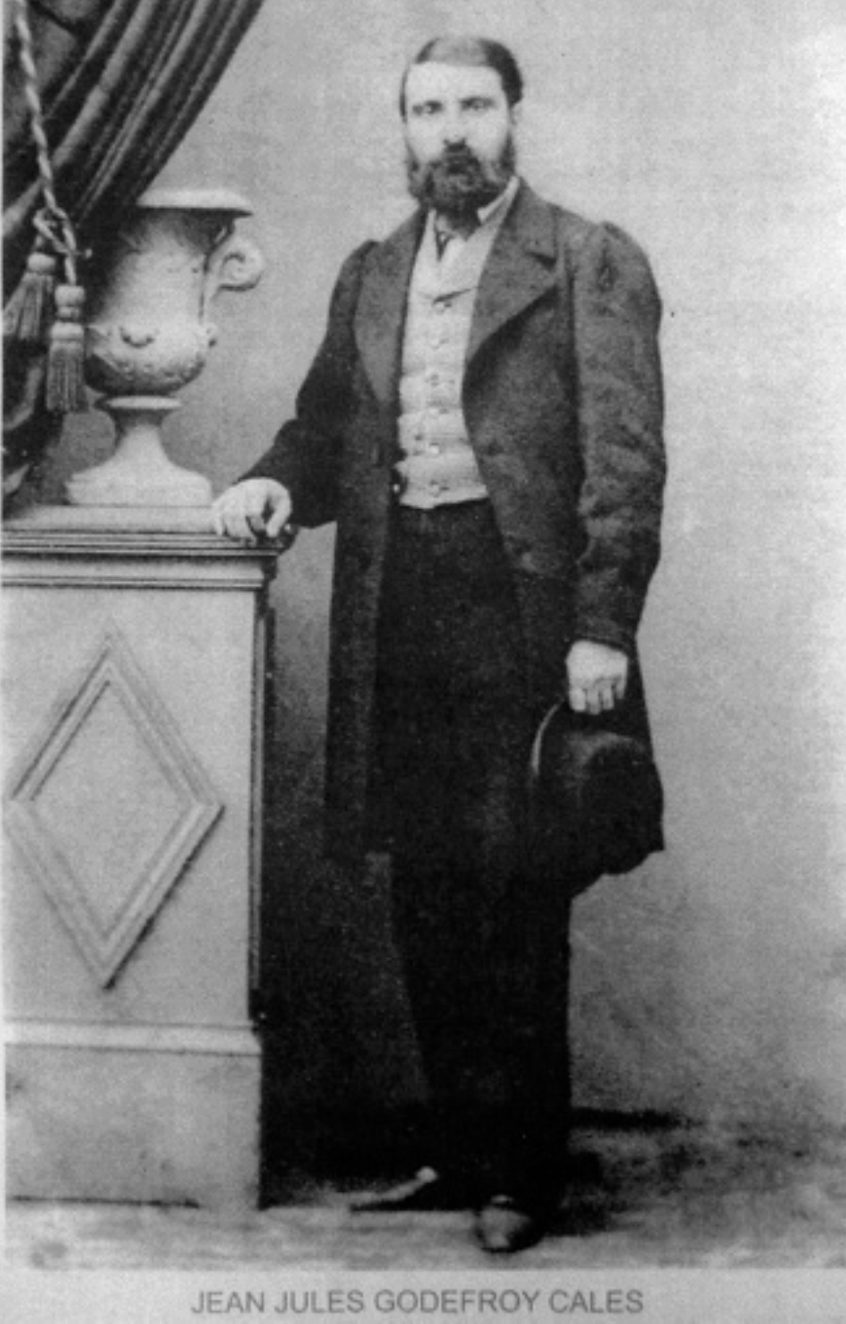 Jean Jules Godefroy Calès. (Photographie Archives Personnelles famille Gouzi)